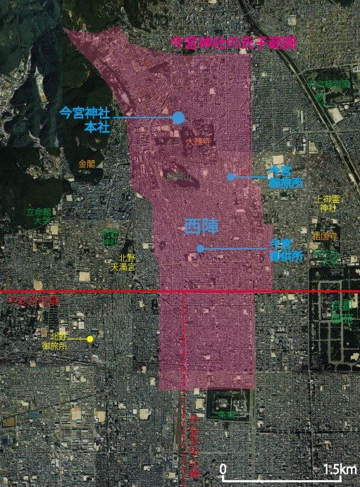 京都府京都市北区に所在する今宮神社の氏子範囲図、以下の参考文献をもとに作成 本多健一「中世後期の京都今宮祭と上京氏子地域の変遷」『歴史地理学』51巻4号2009年